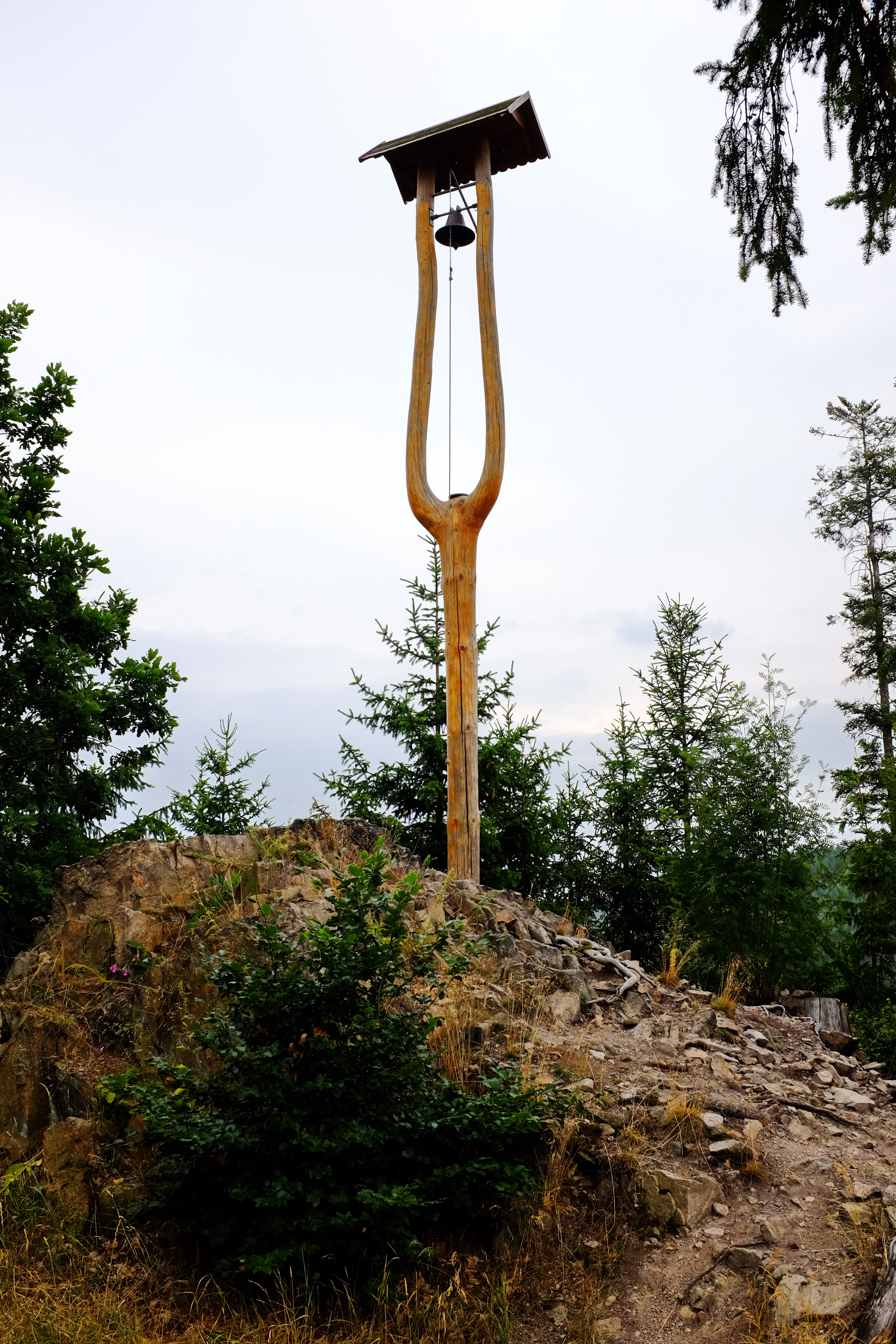 Karlovarské lázeňské lesy, Jungmannův altán, zvonička u altánu, Karlovy Vary